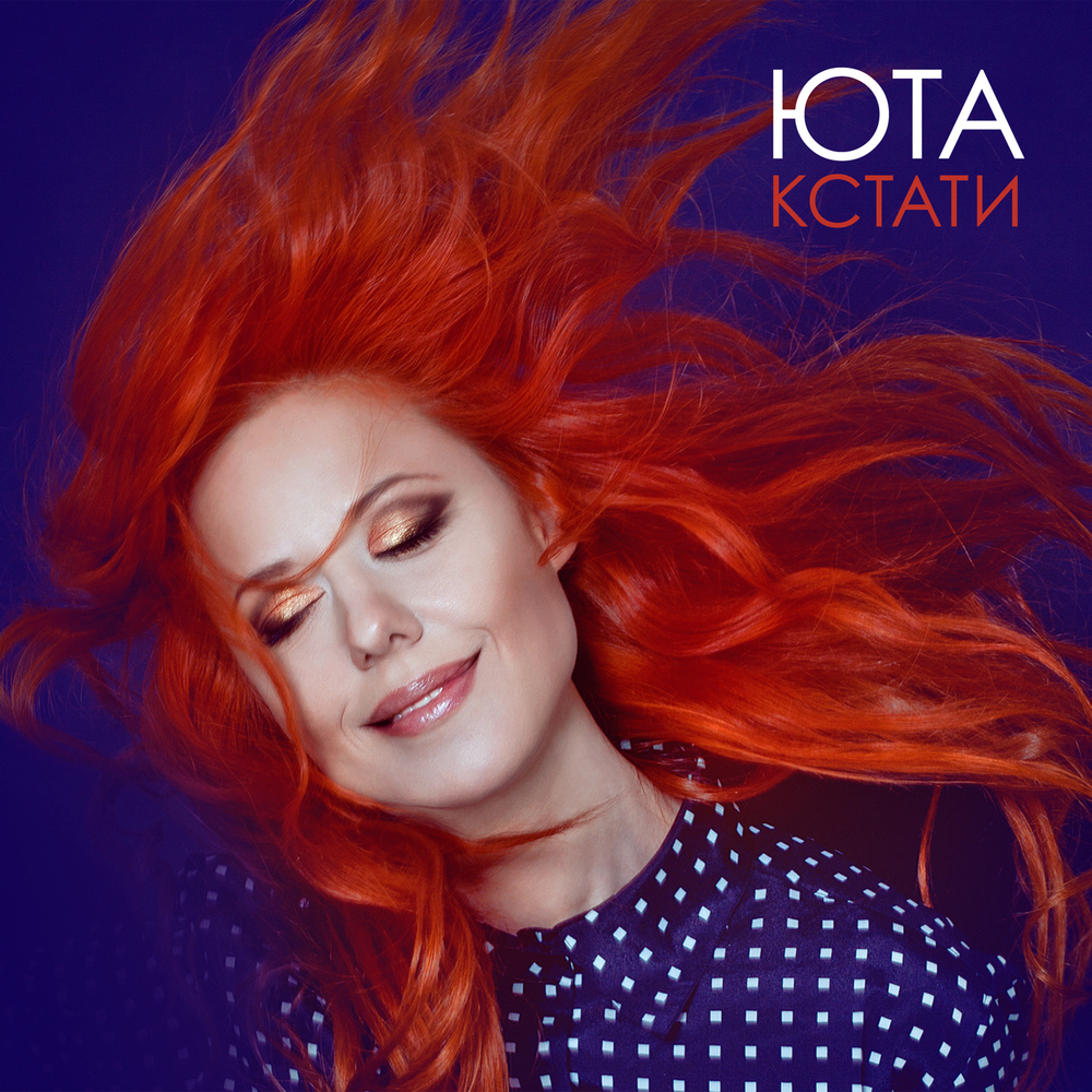 Обложка альбома Юты «Кстати».